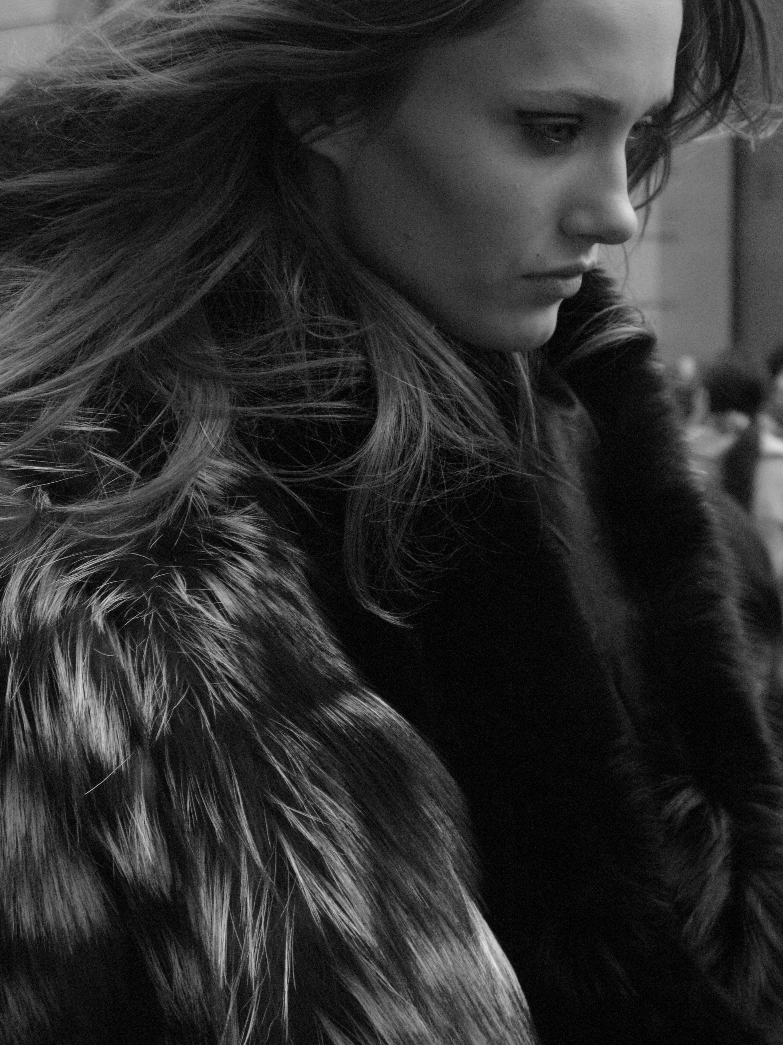 Karmen Pedaru